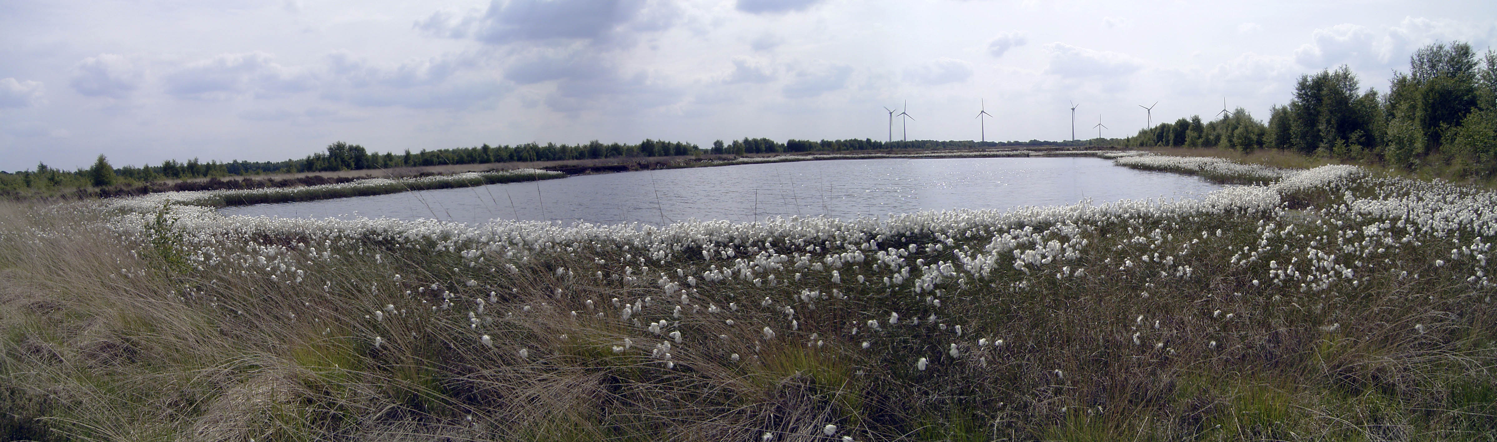 Wiedervernässung im Bereich Schwaneburger Moor (Landkreis Cloppenburg, Niedersachsen), Fazies von Schmalblättrigem Wollgras (Eriophorum angustifolium) am Gewässerrand – abgebildeter Bereich vermutlich an der Straße Birkenkolonie zwischen den Gemeinden Friesoythe und Saterland mit Blick nach Westen, knapp außerhalb des Naturschutzgebiets „Schwaneburger Moor-Nord“